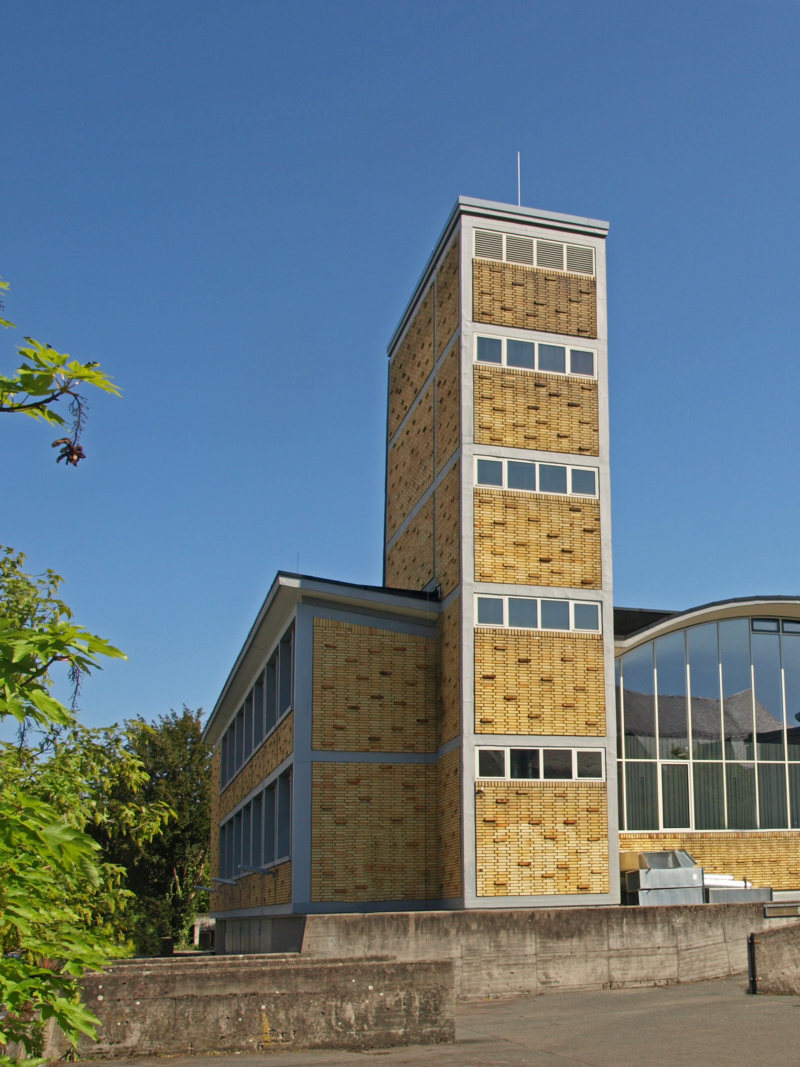 Wasserturm der denkmalgeschützten Wasserbauhalle der TU Darmstadt